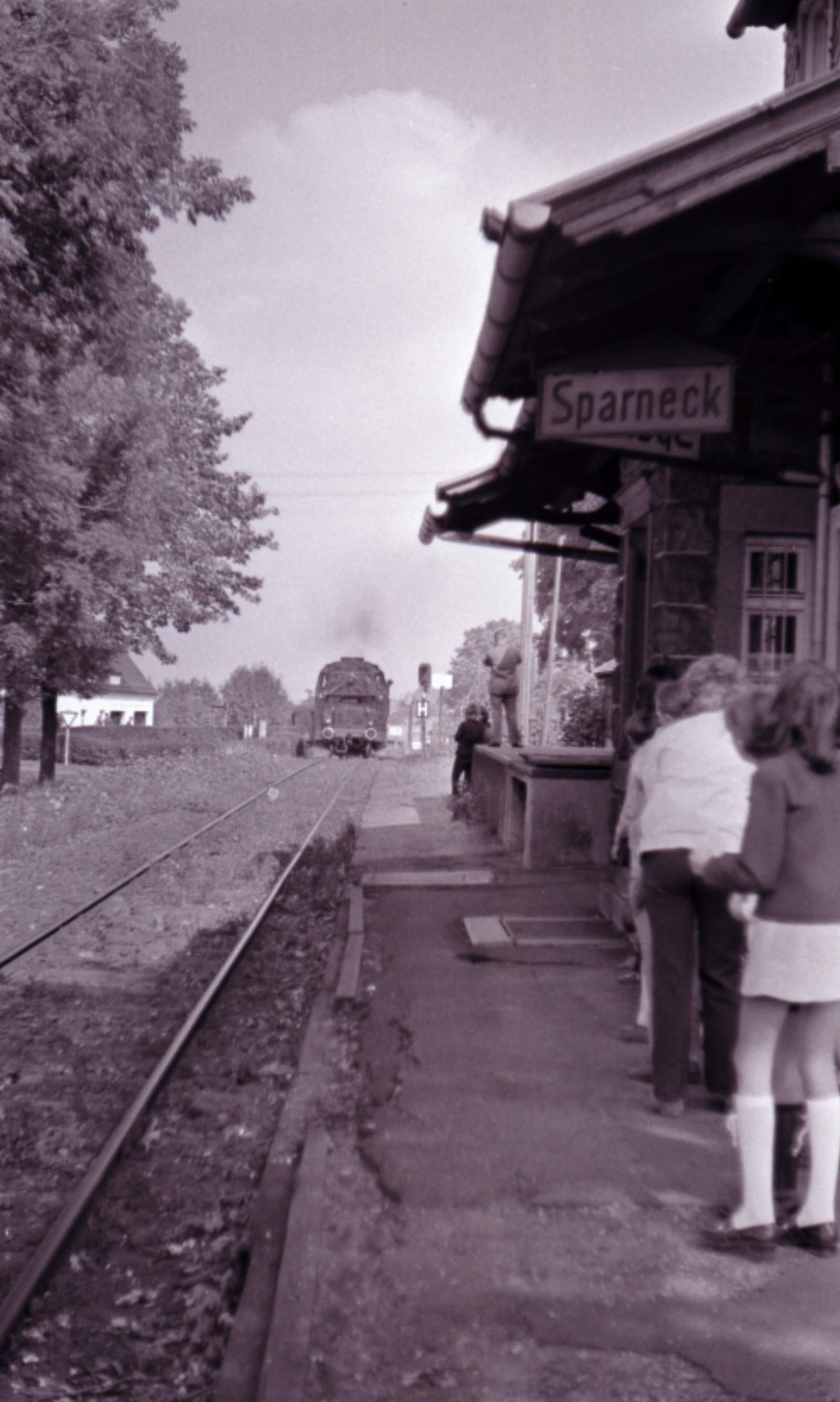 Lokomotive am ehemaligen Bahnhof von Sparneck